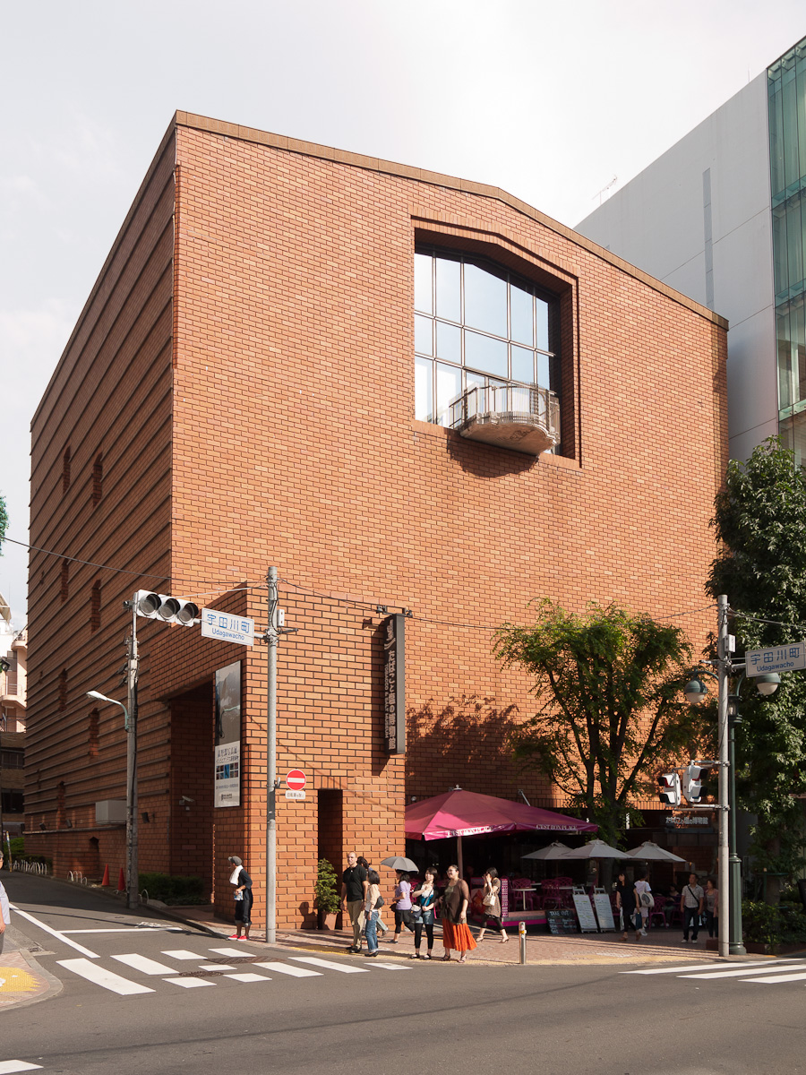 「たばこと塩の博物館」、東京都渋谷区神南1丁目。